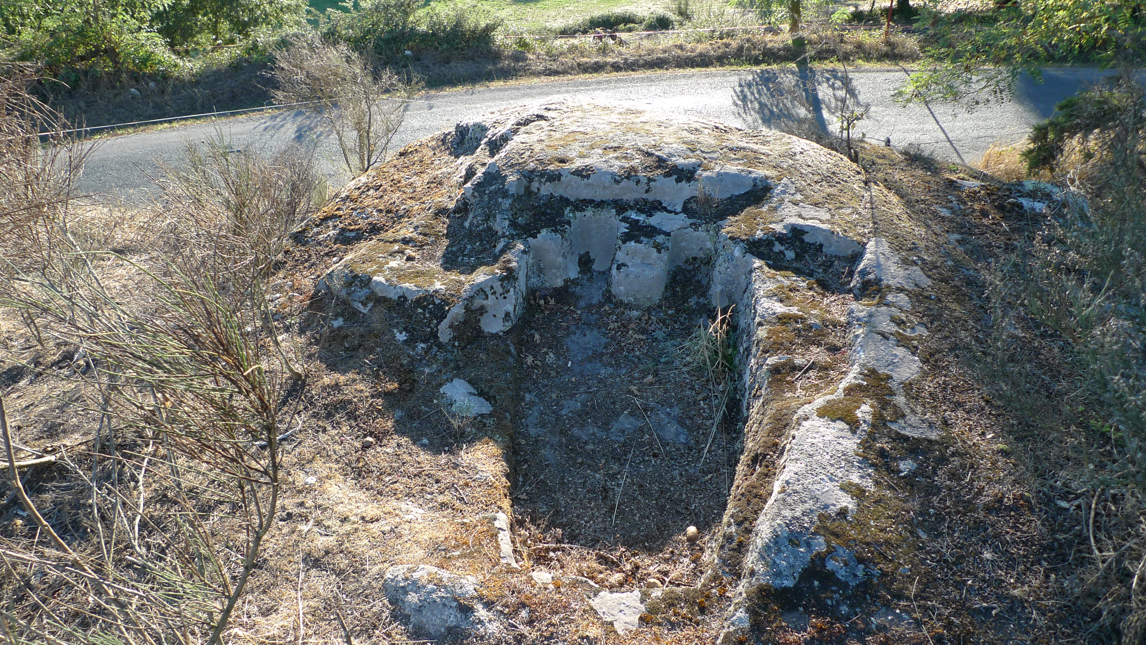 Tumbas antropomorfas de Fornas en Chantada (Lugo)